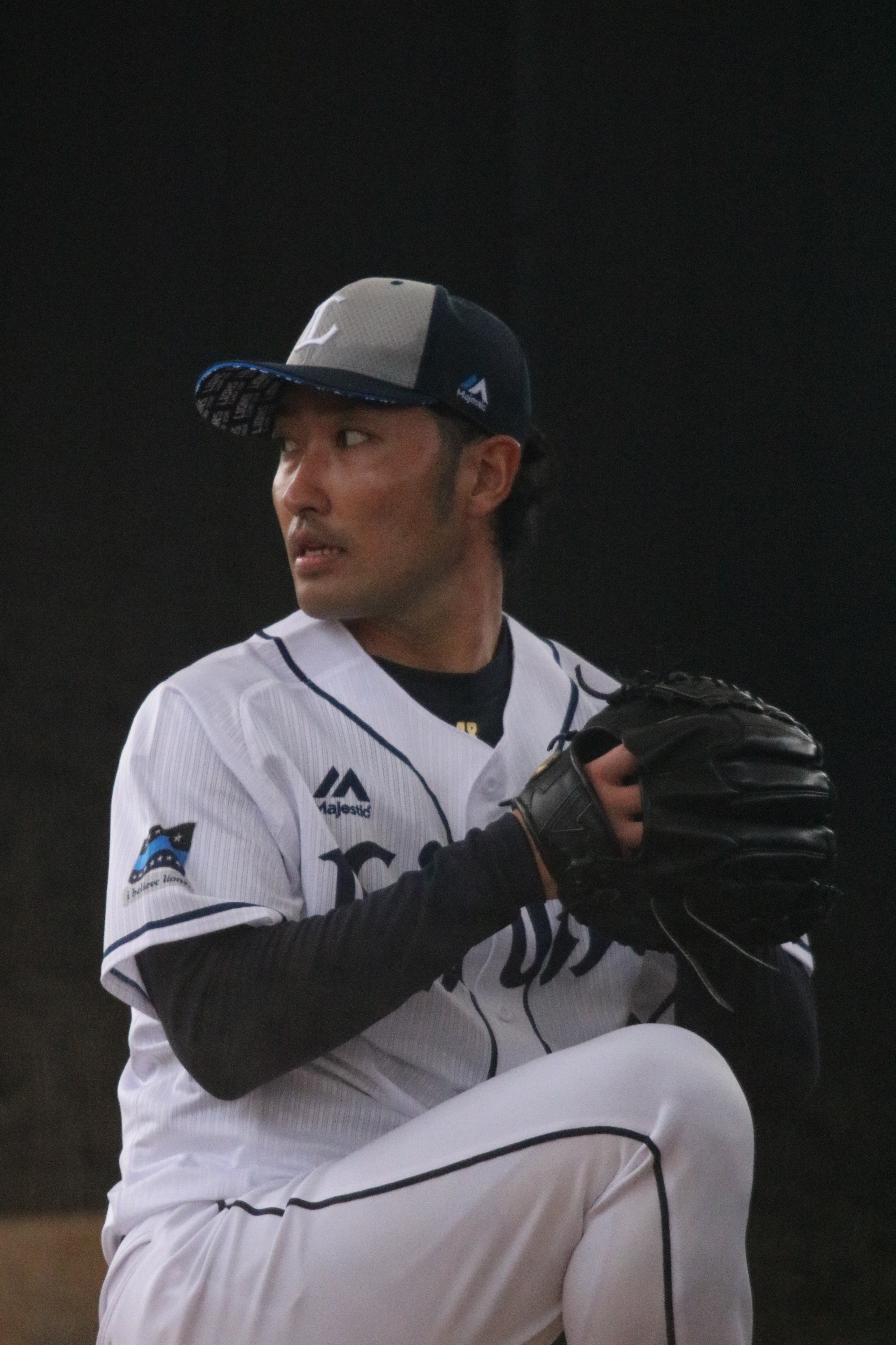 2018/2/9 宮崎・南郷キャンプ